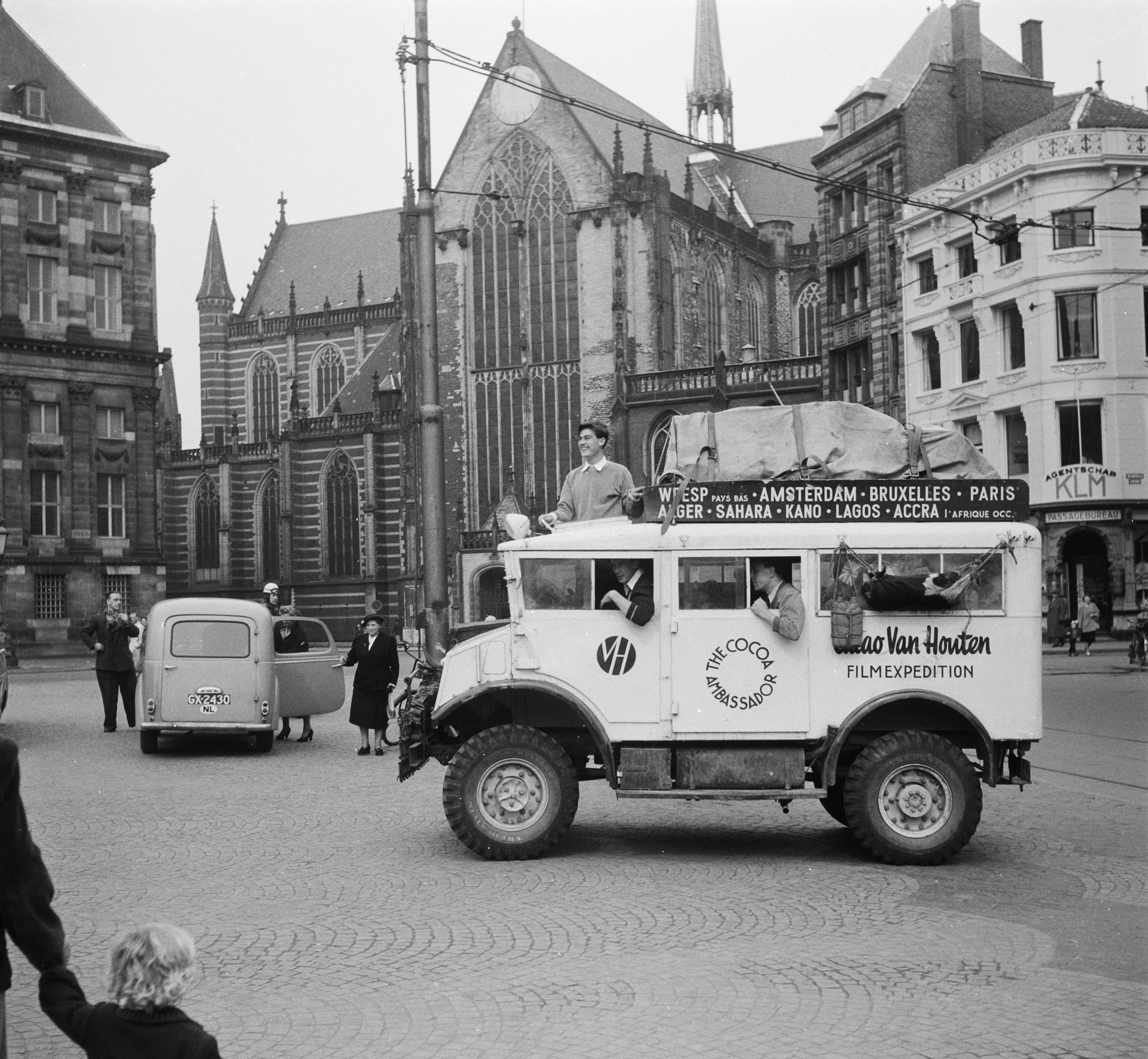 Collectie / Archief : Fotocollectie Anefo Reportage / Serie : [ onbekend ] Beschrijving : Van Houten expeditie terugkeer in Amsterdam Datum : 12 april 1952 Locatie : Amsterdam, Noord-Holland Trefwoorden : EXPEDITIES Fotograaf : Noske, J.D. / Anefo Auteursrechthebbende : Nationaal Archief Materiaalsoort : Negatief (zwart/wit) Nummer archiefinventaris : bekijk toegang 2.24.01.03 Bestanddeelnummer : 905-0497